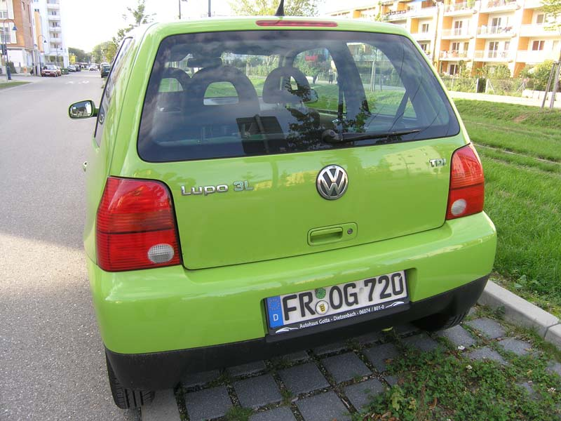 VW Lupo 3l eigene Aufnahme Freiburg 2006